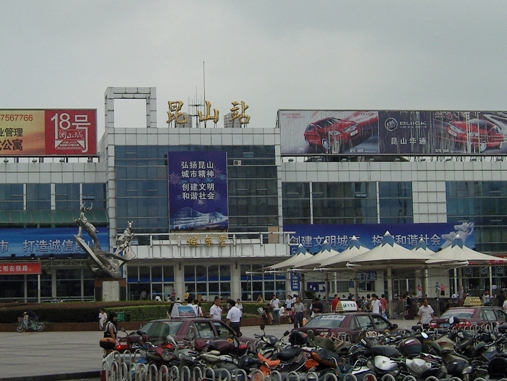 中國昆山站